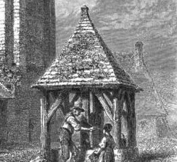 Puits se trouvant dans l'enceinte du prieuré de Saint-Jean-du-Gray.